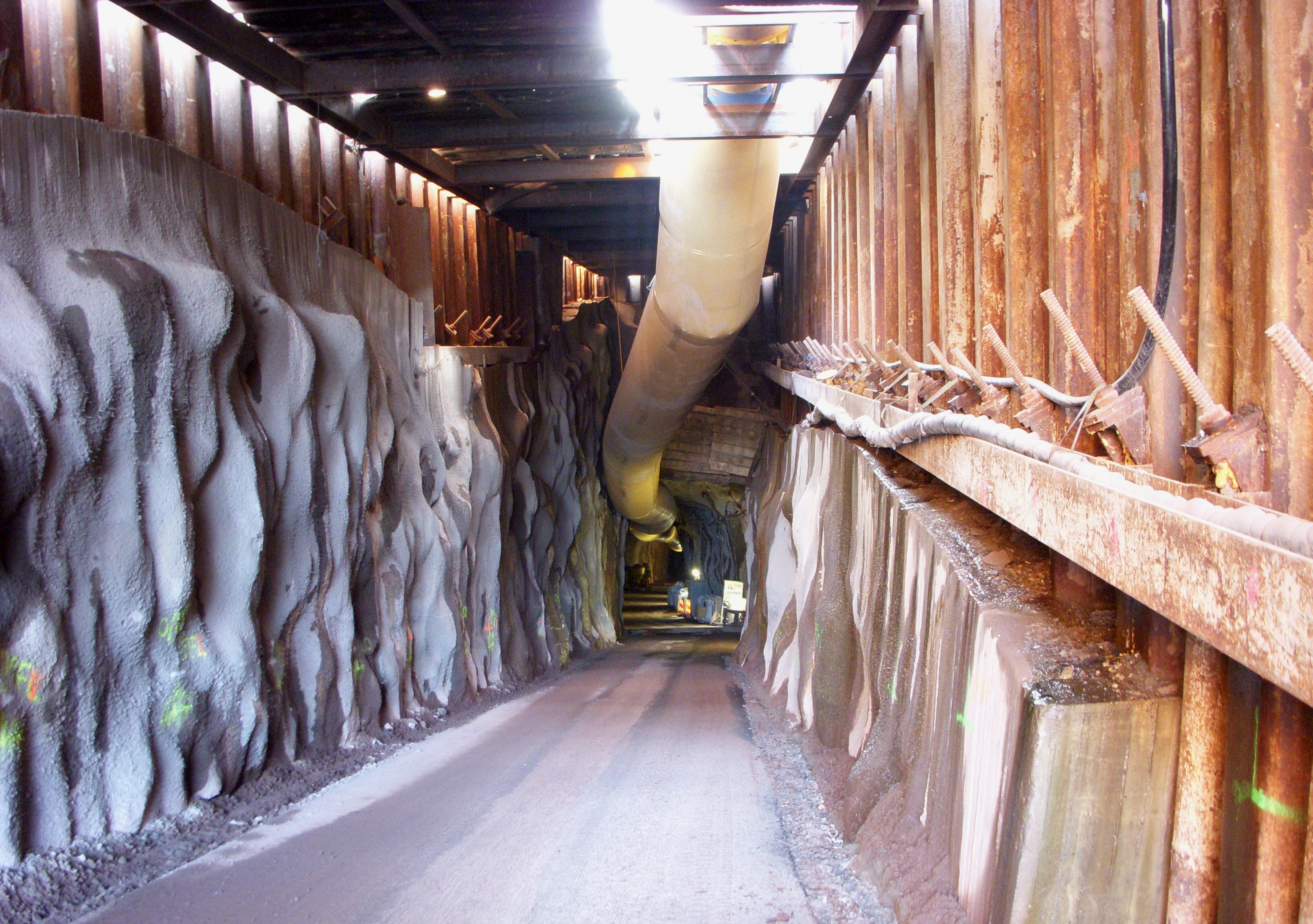 Citybanan i Stockholm, arbetstunneln vid Torsgatan